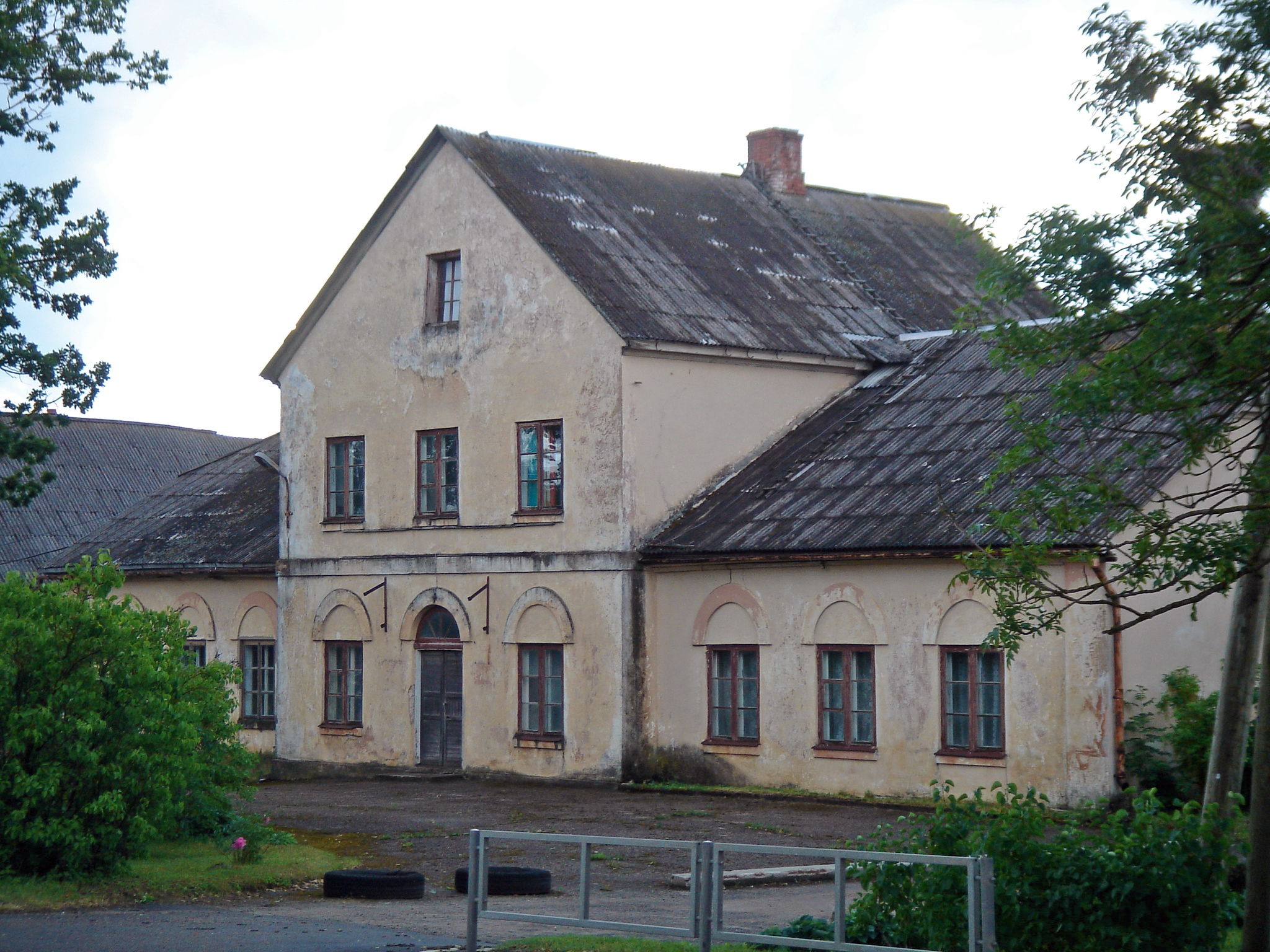 Veselavas zirgu pasta stacija Bērzkrogā